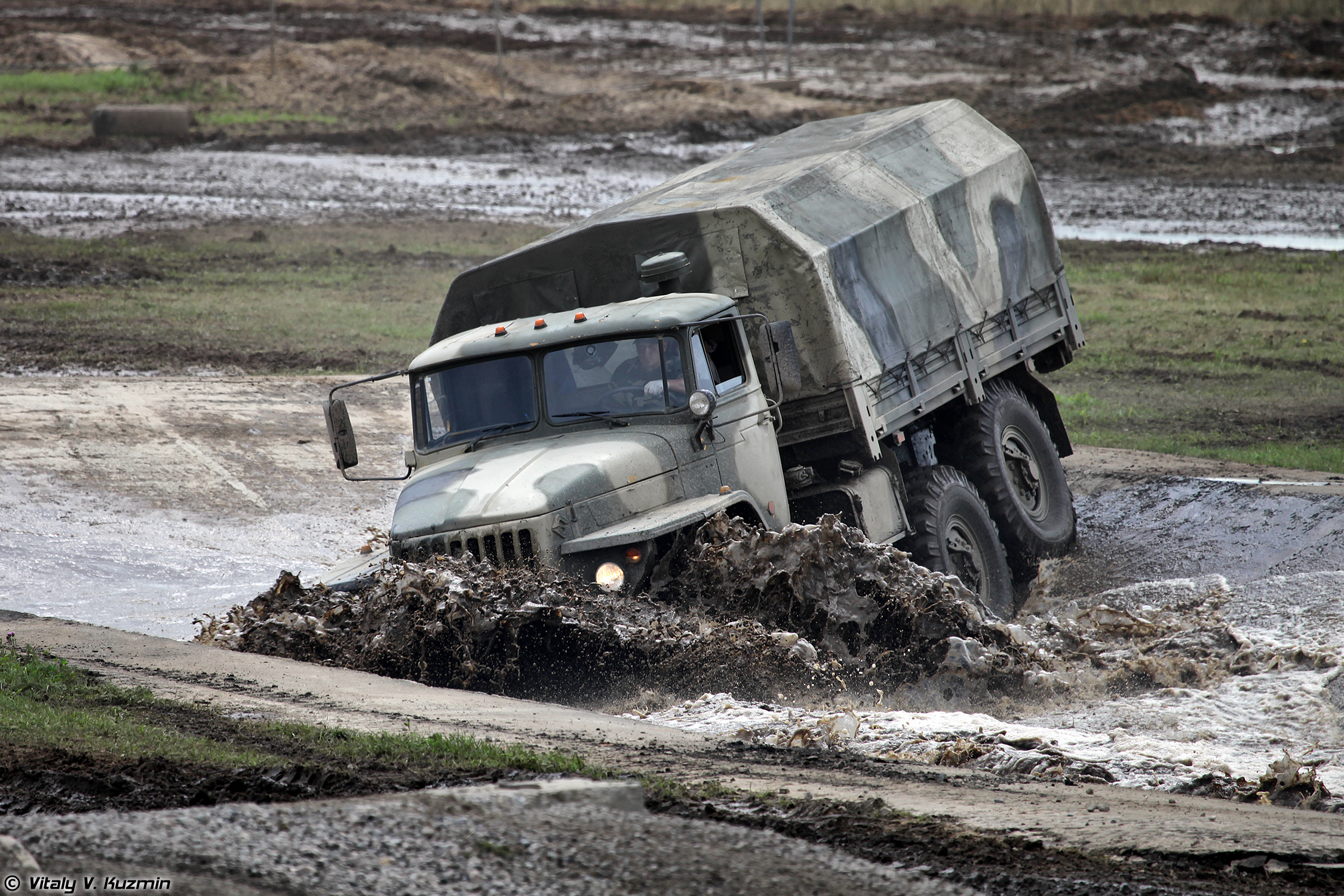 Урал-4320 (Ural-4320)